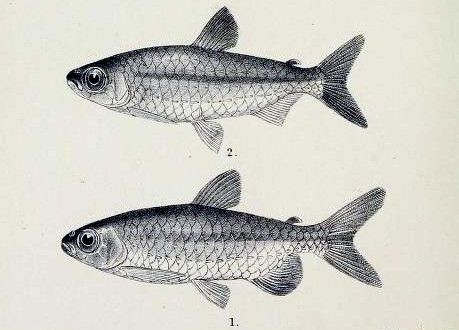 Micralestes stormsi